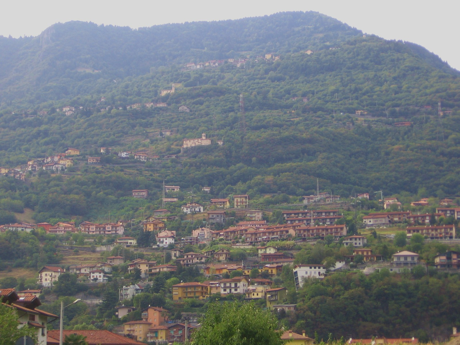 Costa Volpino, Bergamo, Italy